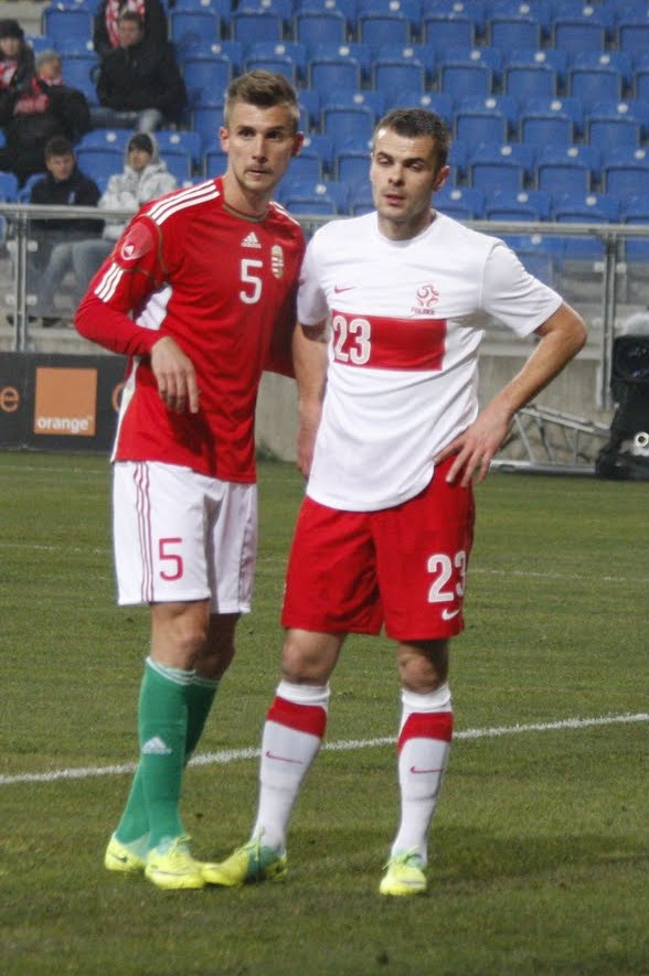 Tamás Priskin and Paweł Brożek, Hungarian- and Polish football players